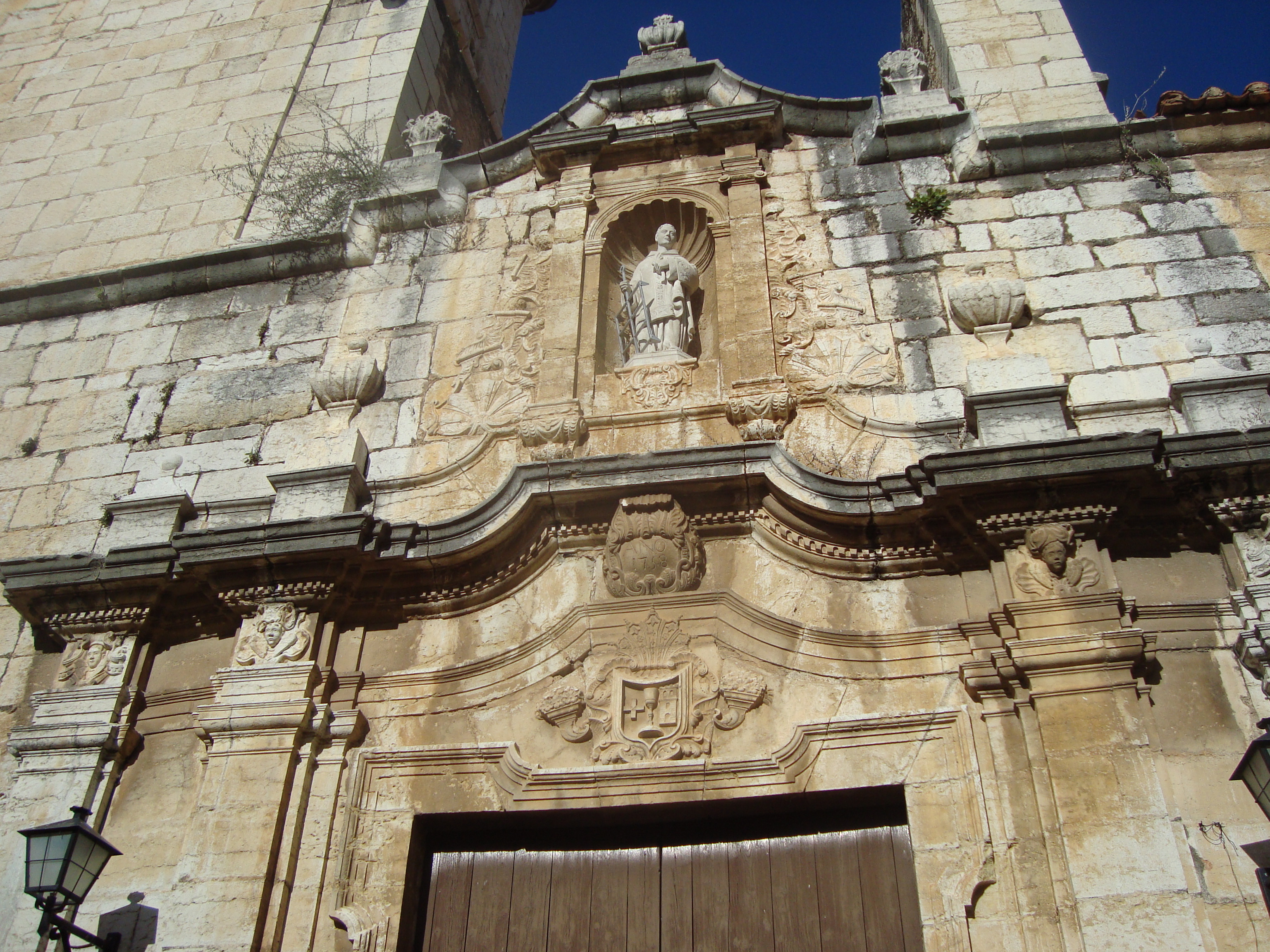 Pórtico de fachada principal de la iglesia parroquial de Càlig, Castellón